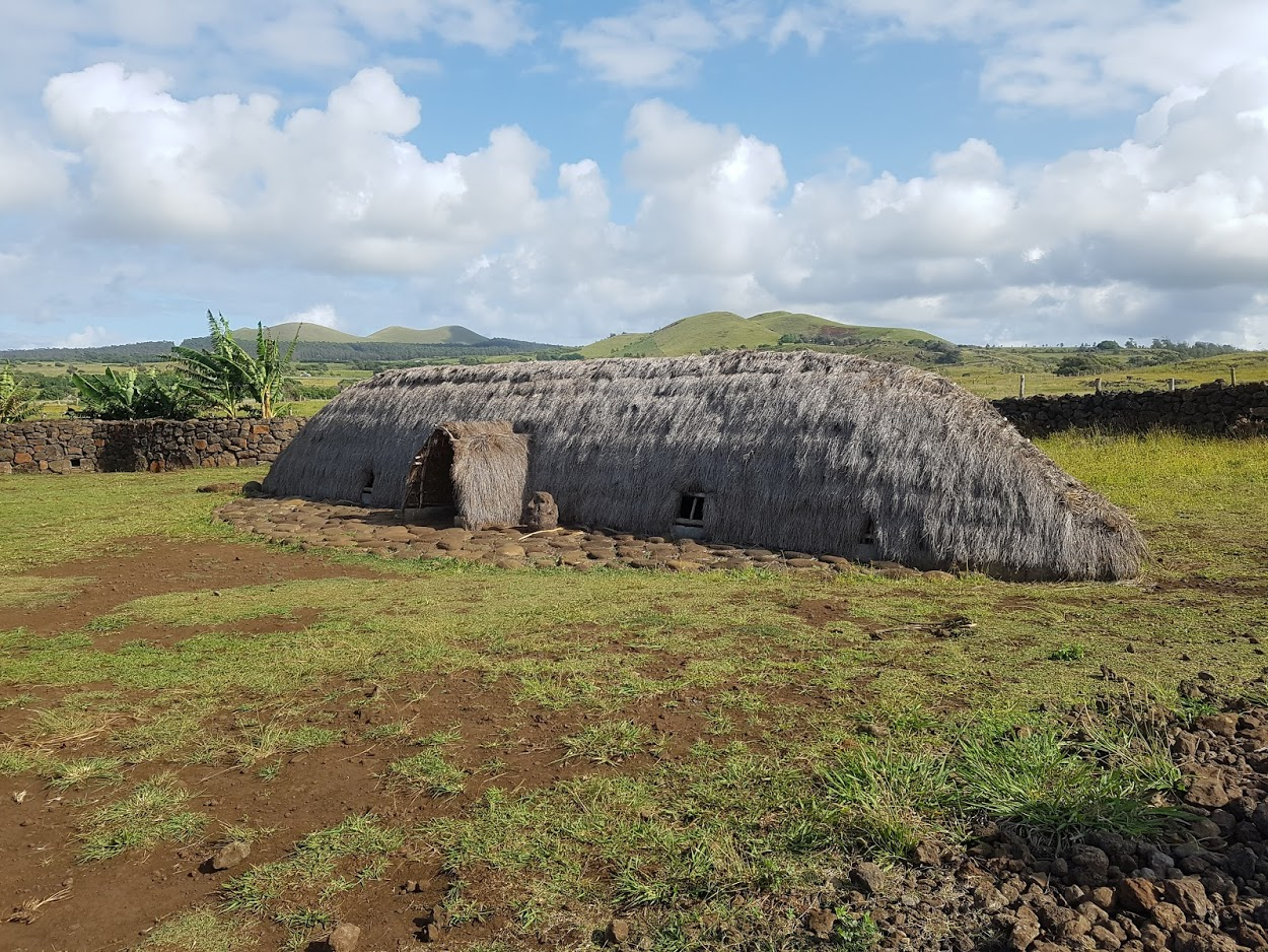 שחזור של בית מגורים ("הארה פאנגה")